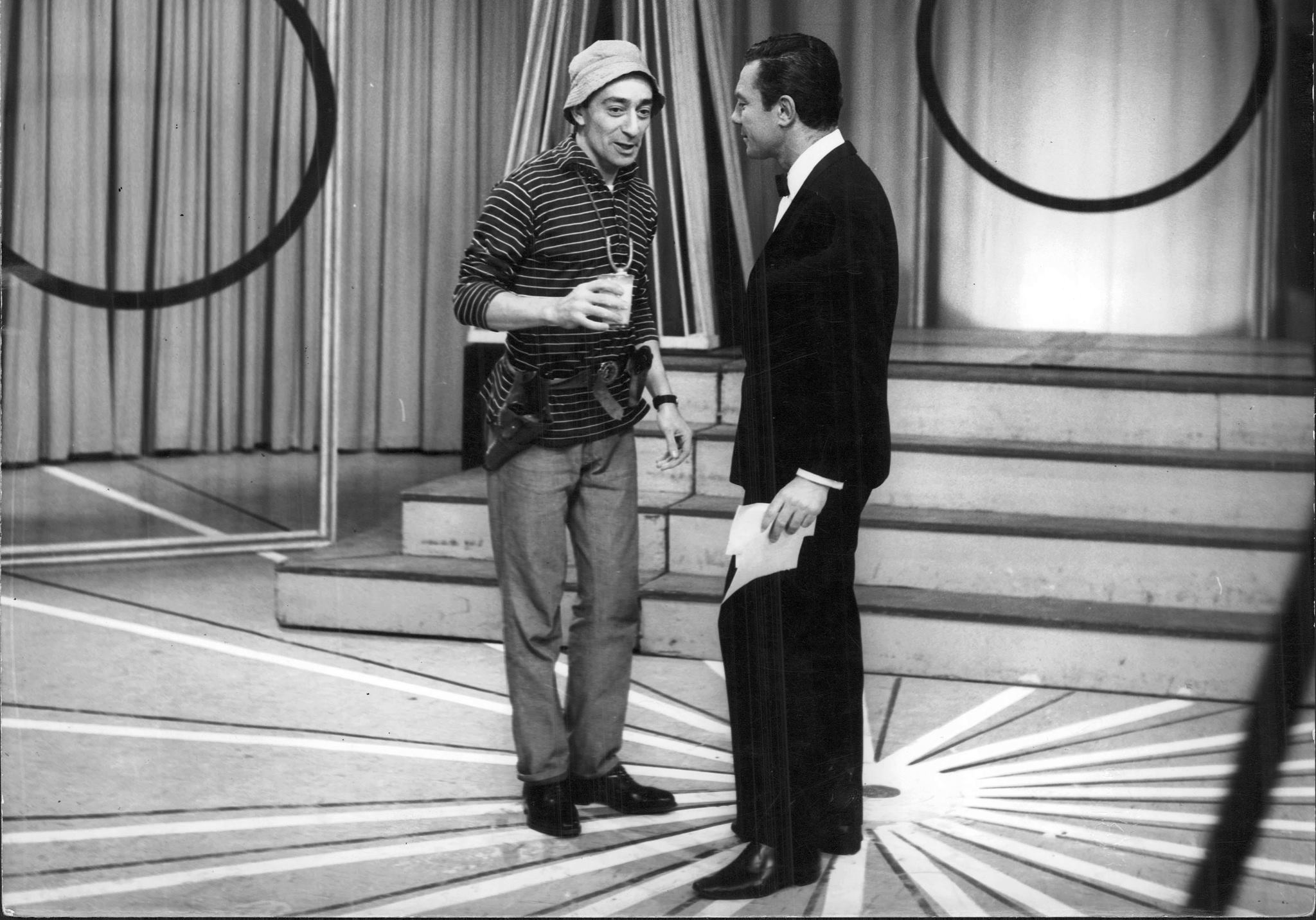 El actor y comediante argentino Alberto Olmedo, caracterizado como su personaje Piluso, en un programa de LS82 TV Canal 7, actual Televisión Pública, junto al presentador Augusto Bonardo, en 1962.